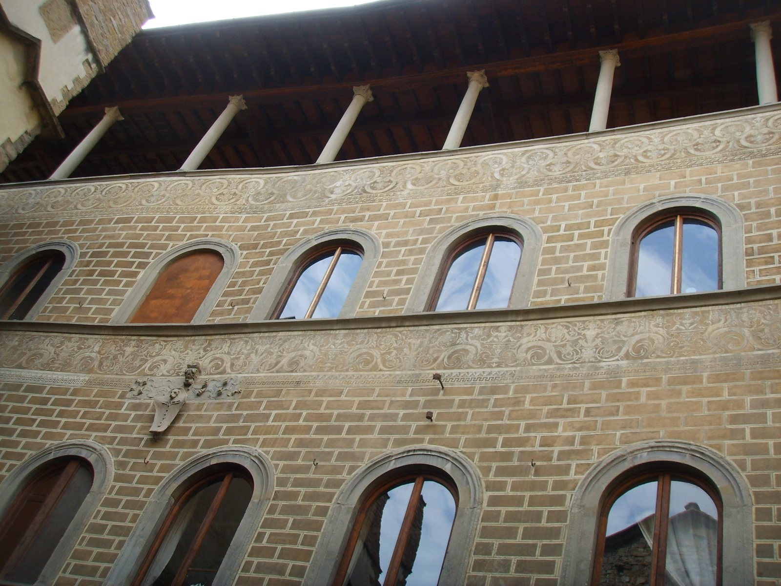 Palazzo canacci, facciata